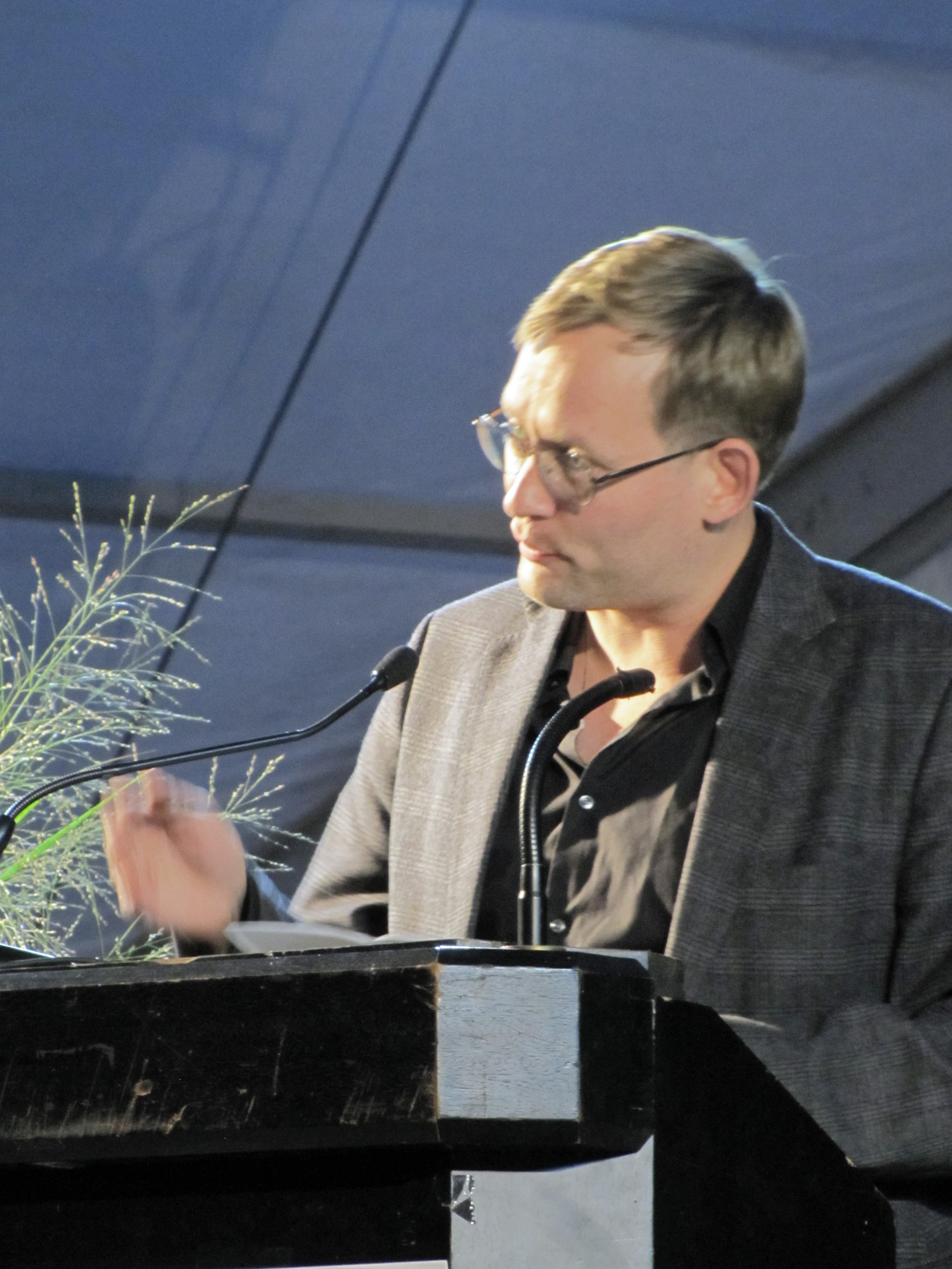 Clemens Meyer (neuer Stadtschreiber), beim Stadtschreiberfest 2018, im Festzelt in Bergen.